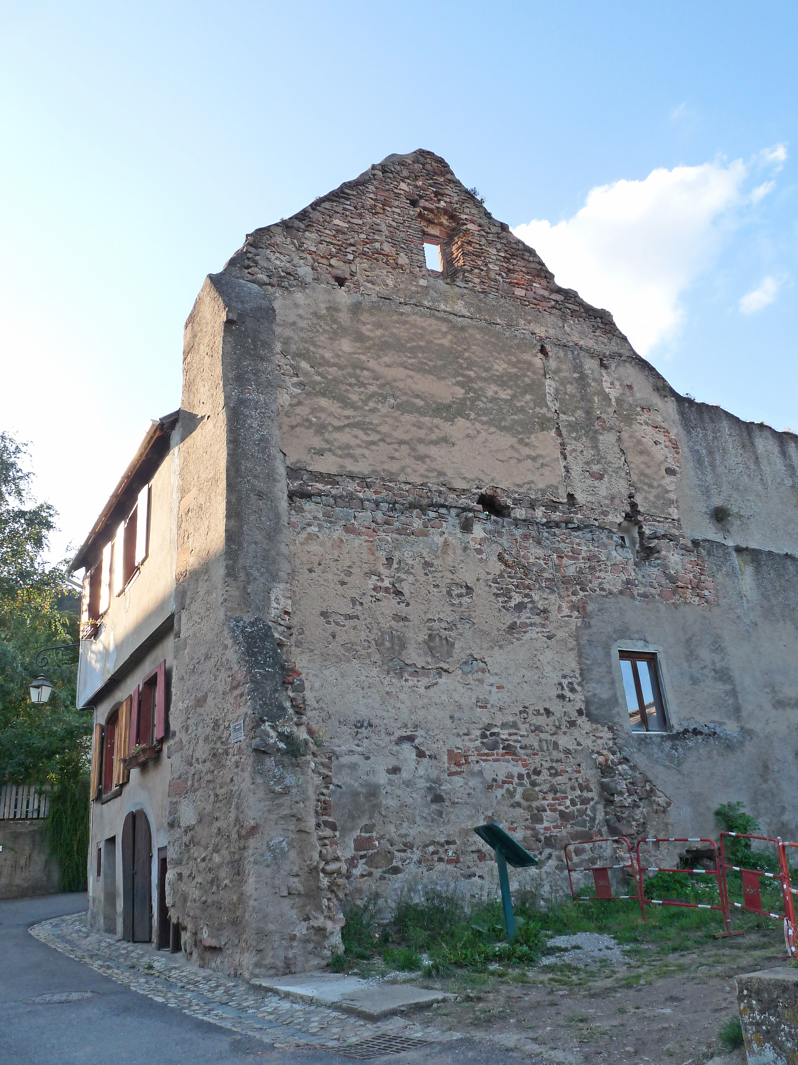 Châtenois (Bas-Rhin) : Amthaus. Siège de l'administration du bailliage de Châtenois et du Comte Ban. Brûle par les Suédois en 1633.